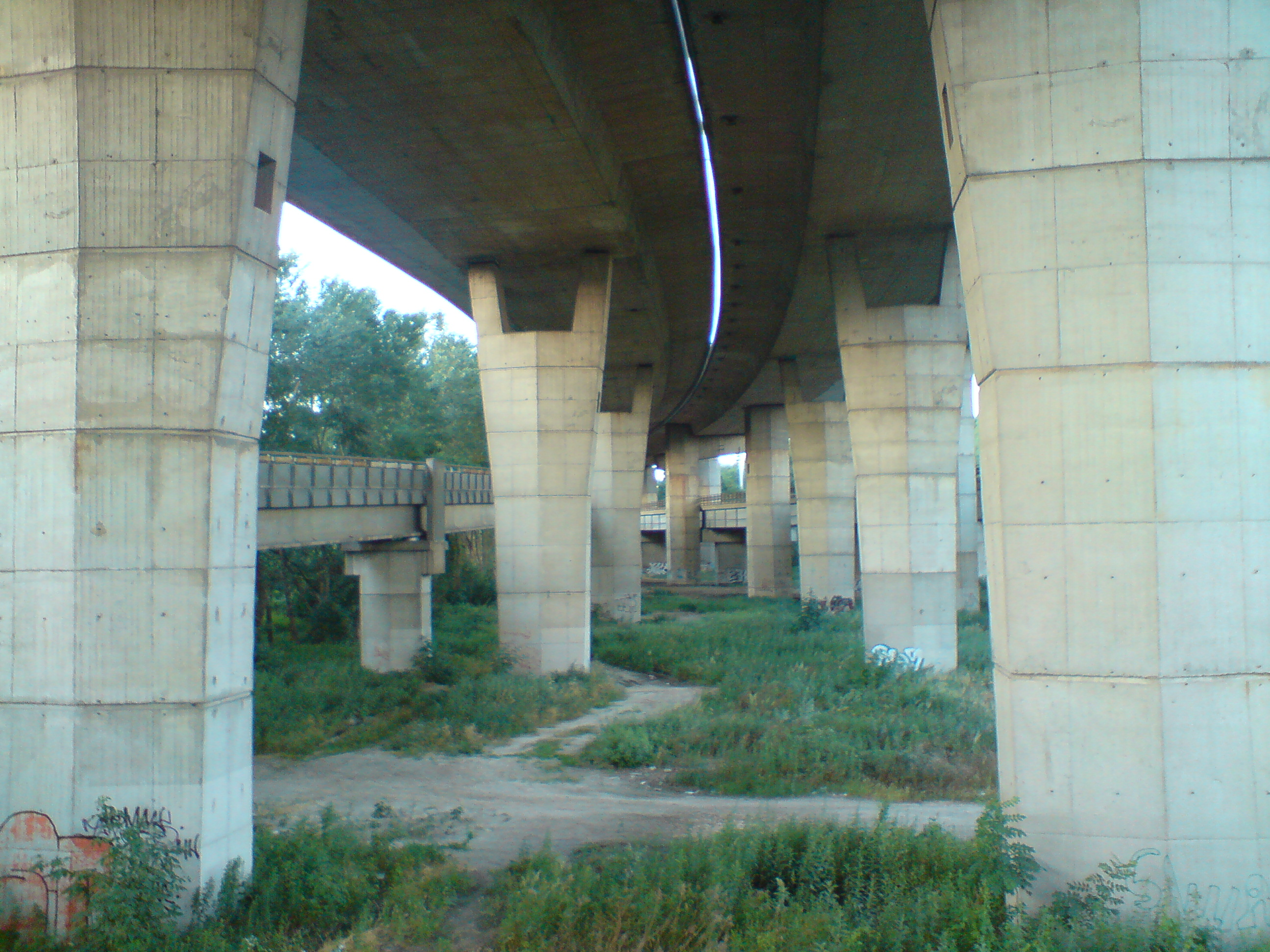 Podpery Prístavného mostu